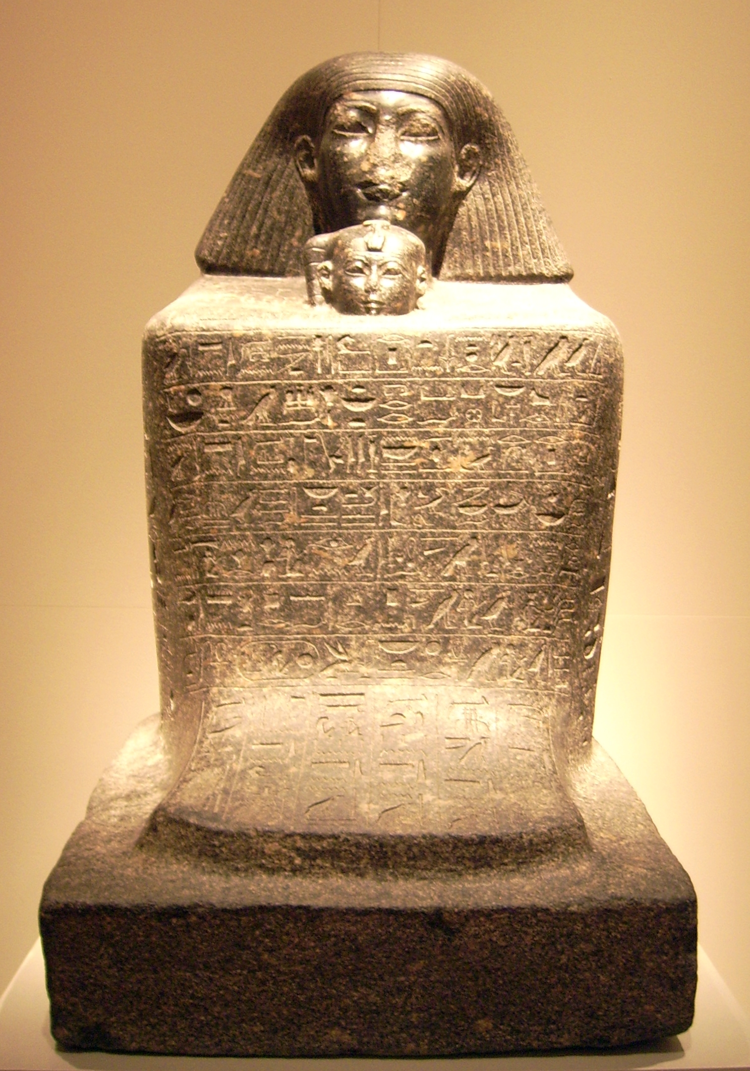 Würfelfigur des Senenmut; Neues Reich, 18. Dynastie, um 1475 v. Chr.; Granit; Fundort Theben/Karnak ?; Ägyptisches Museum/Altes Museum, Inv.-Nr. 2296